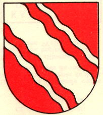 Wapen von Poliez le Grand Kanton Waadt Schweiz